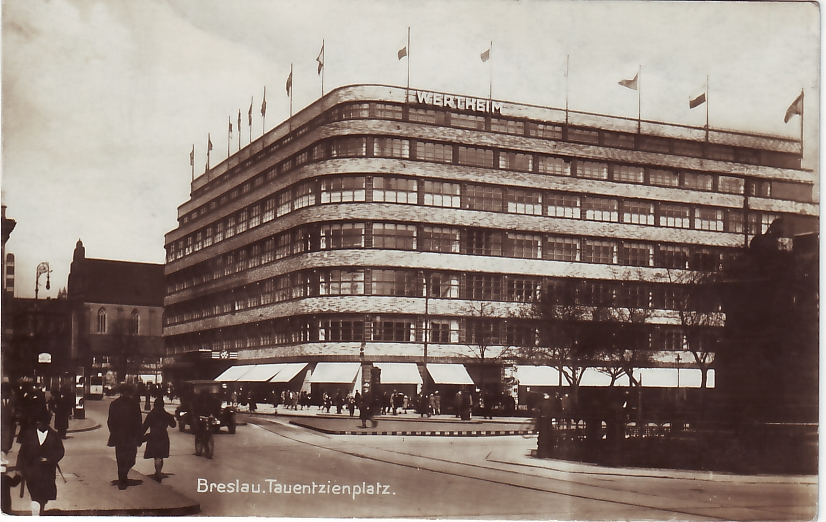 Dom Towarowy Wertheim. Późniejszy PDT we Wrocławiu.